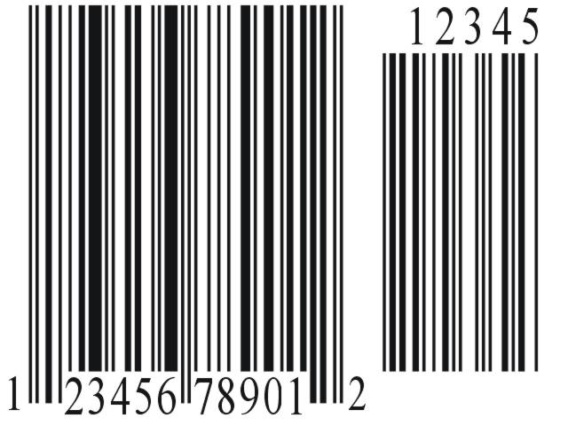 Do Vương Ngân Hà tạo ra, đưa vào sử dụng trong phạm vi công cộng.